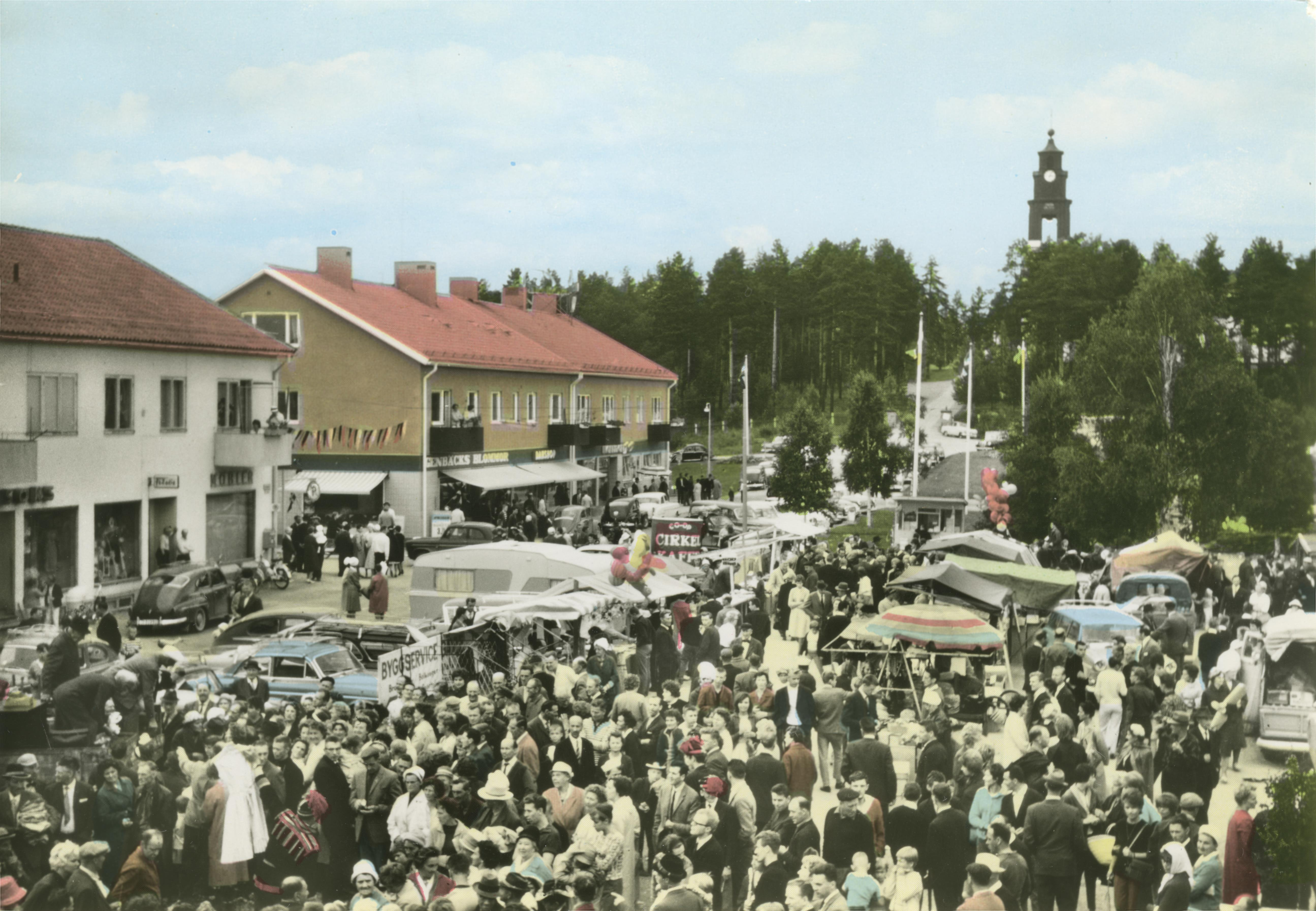 Marknad i Åsele. Handkolorerad variant av ac01221.; Miljöer; Torgmiljö